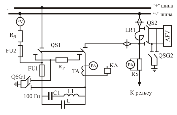 схема